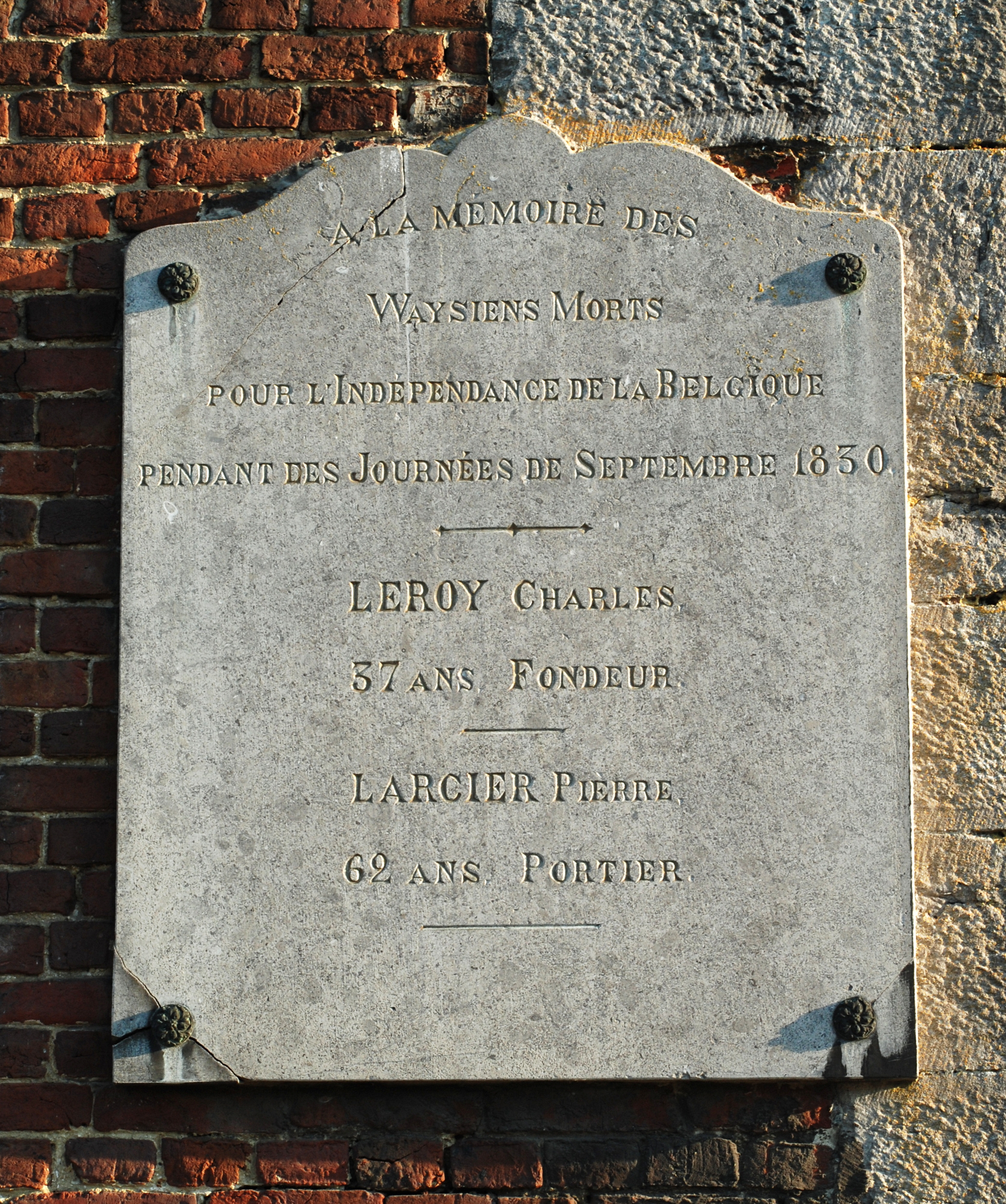 Belgique - Brabant wallon - Église Saint-Martin de Ways